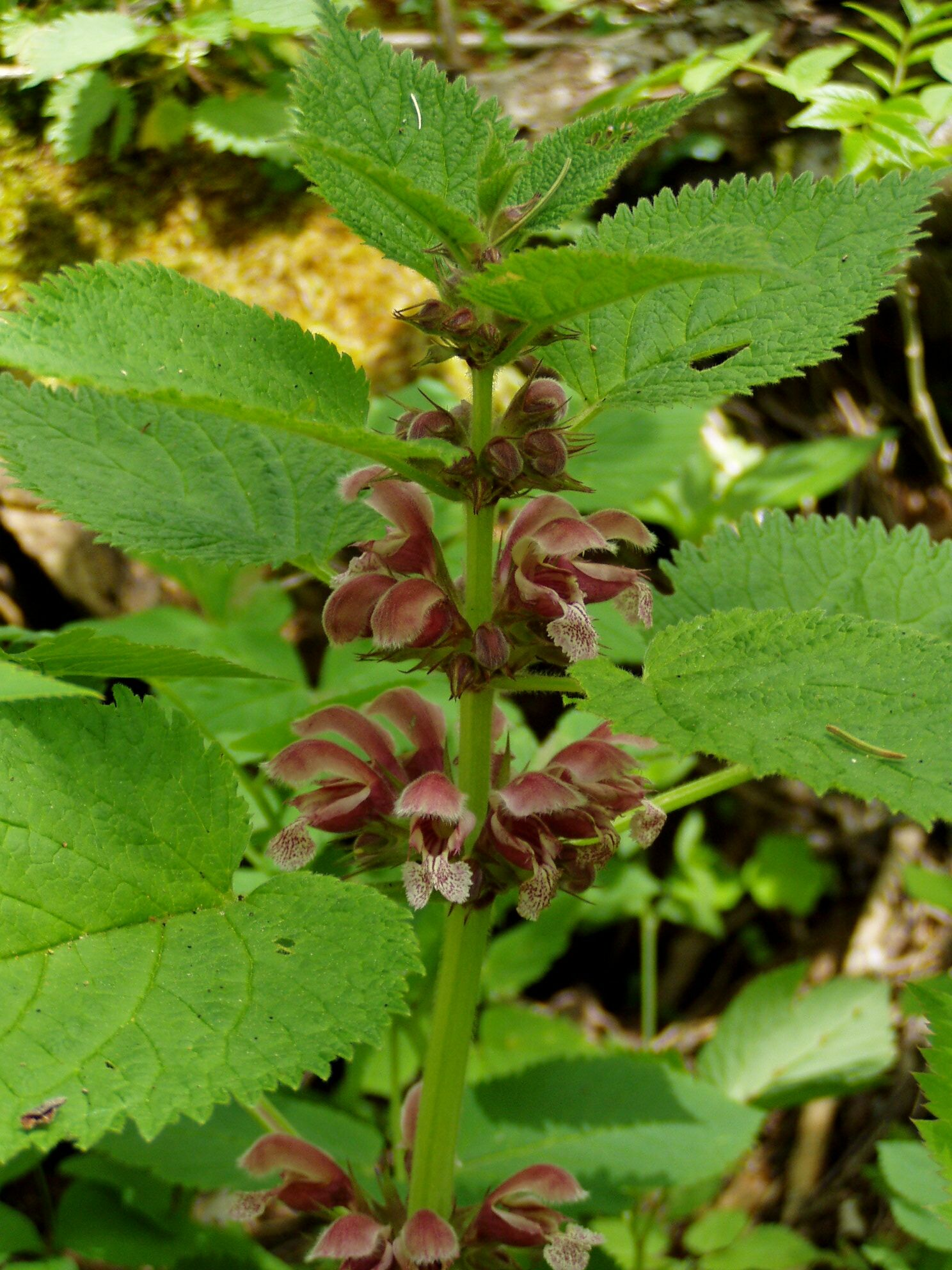 Lamium orvala. Loibltal unterhalb GH Deutscher Peter, ca. 650 m